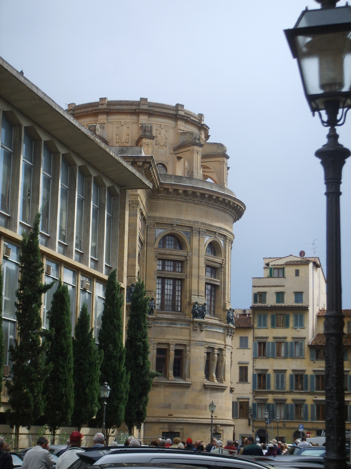 Bncf, rotonda, esterno